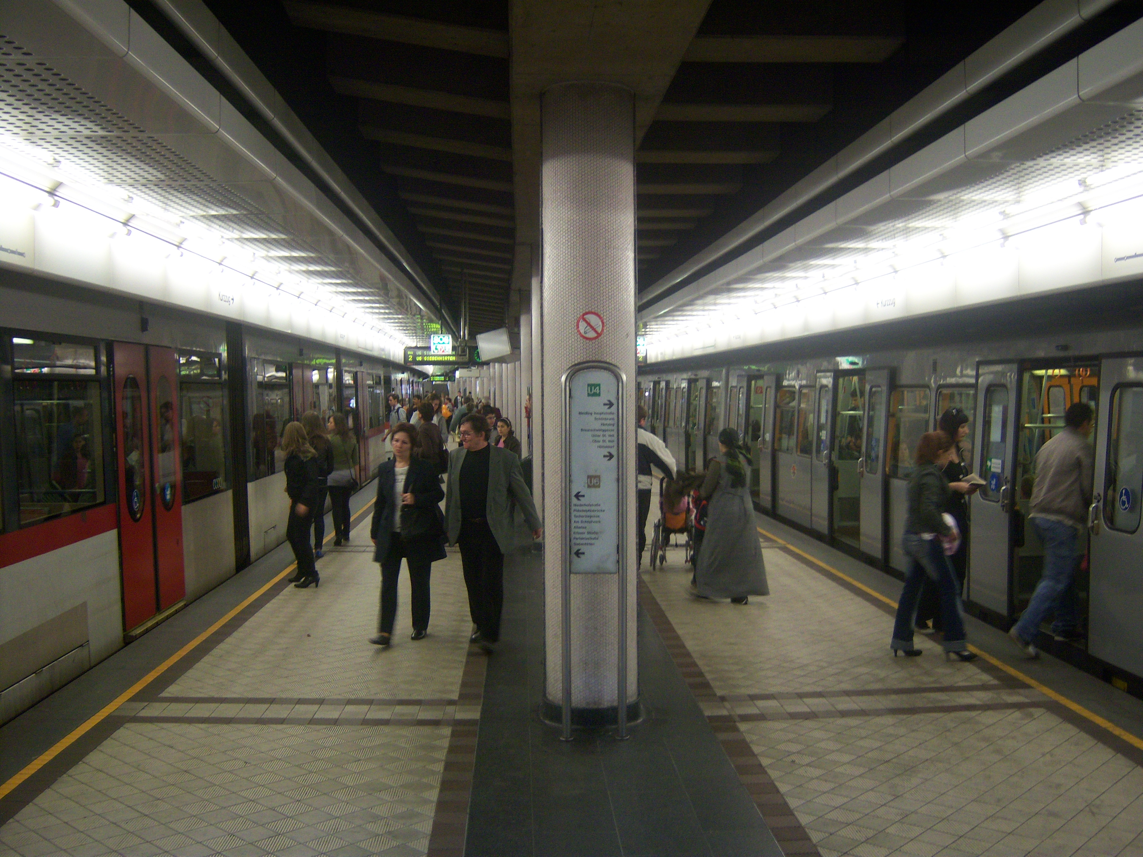 U4/U6-Station Längenfeldgasse